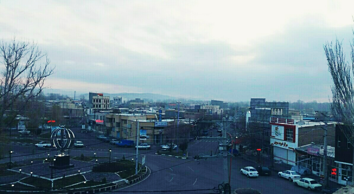 Mehraban city from above